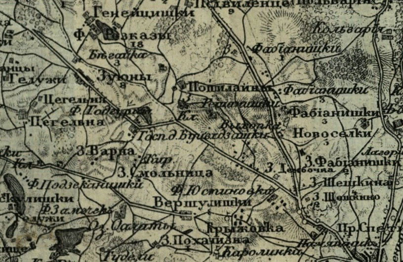 Buidydiškių dvaras 1869 kariniame topografiniame plane